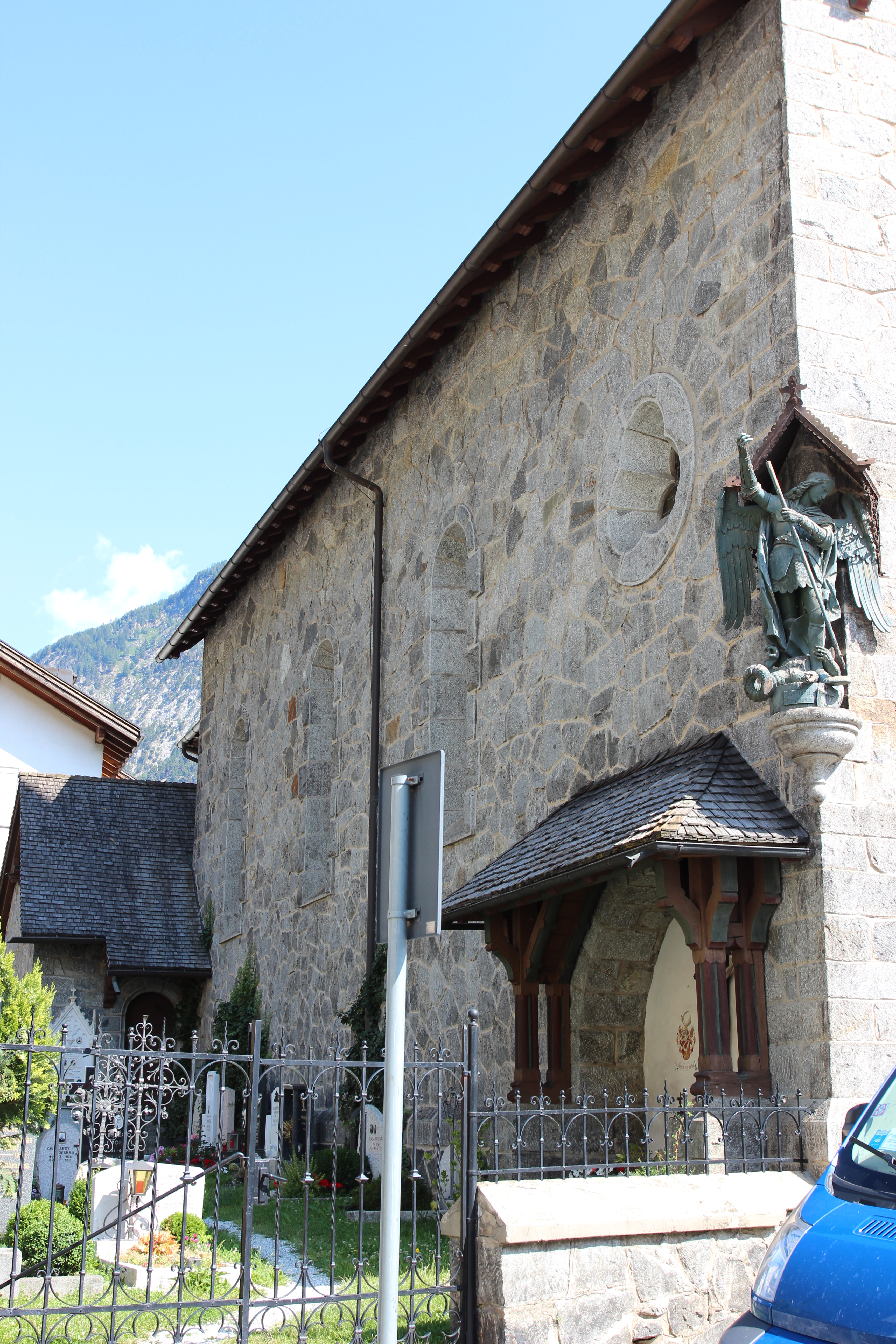 Pfarrkirche zum Heiligsten Herzen Jesu mit Friedhof, Franzensfeste, Südtirol.